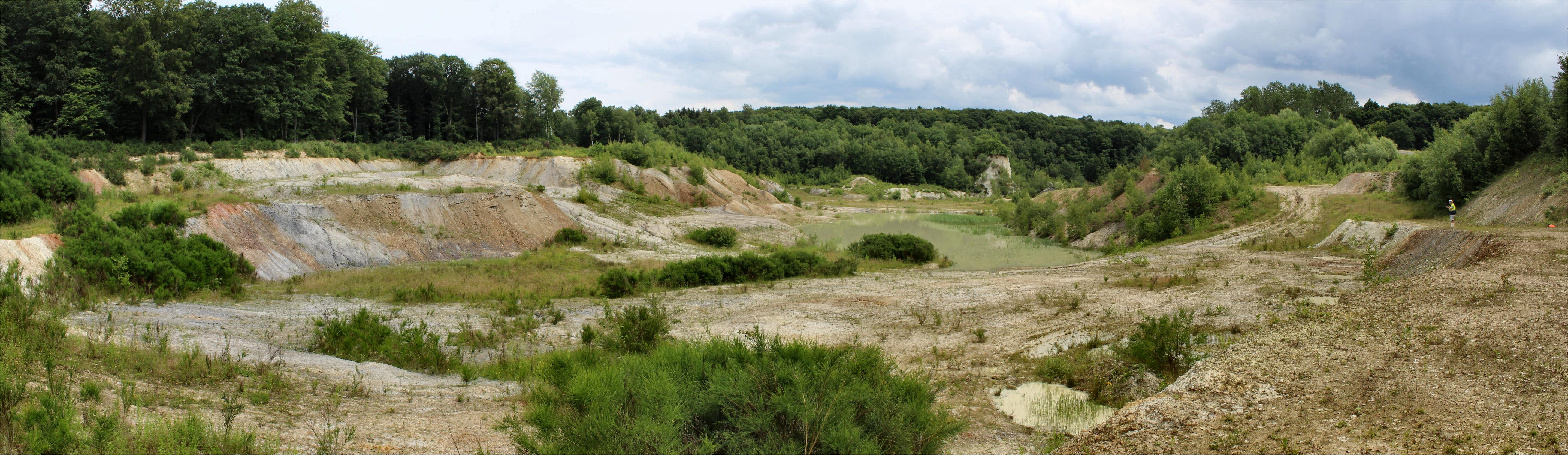 Tongrube in Wachtberg